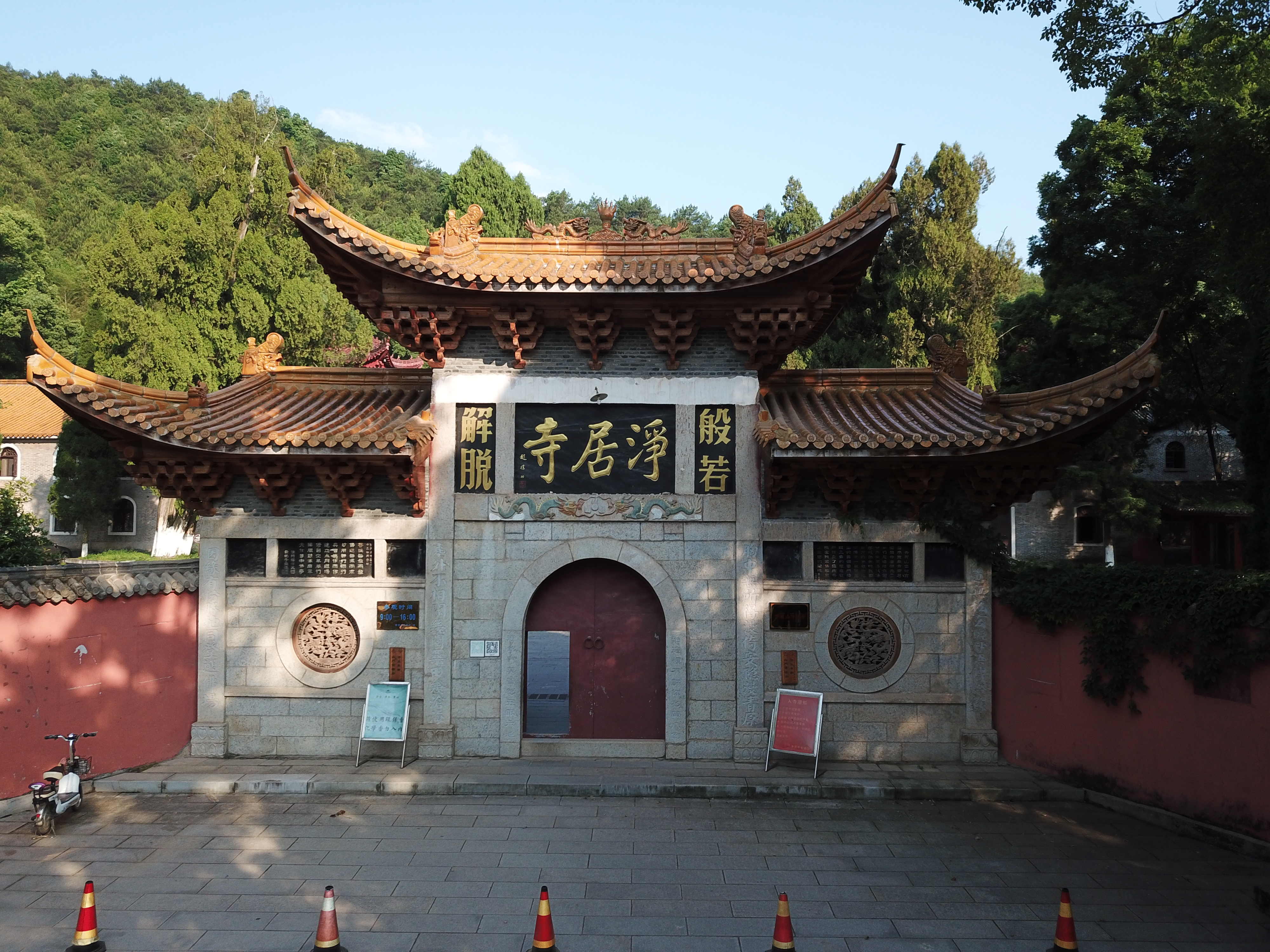 净居寺